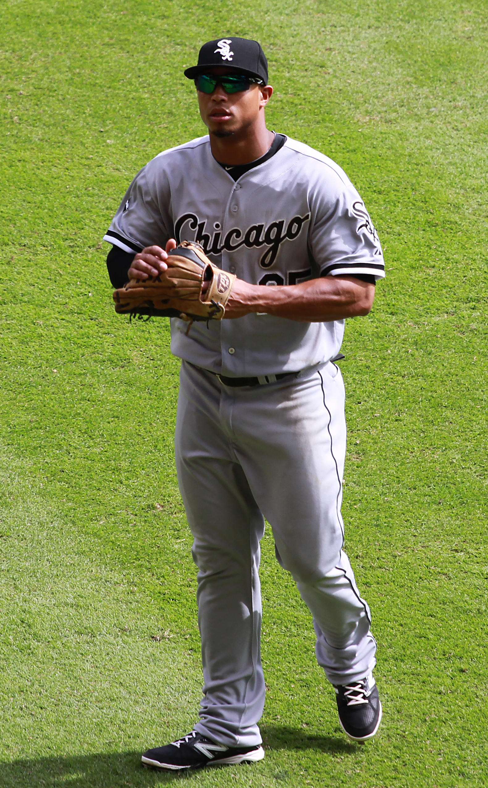 Moisés Sierra